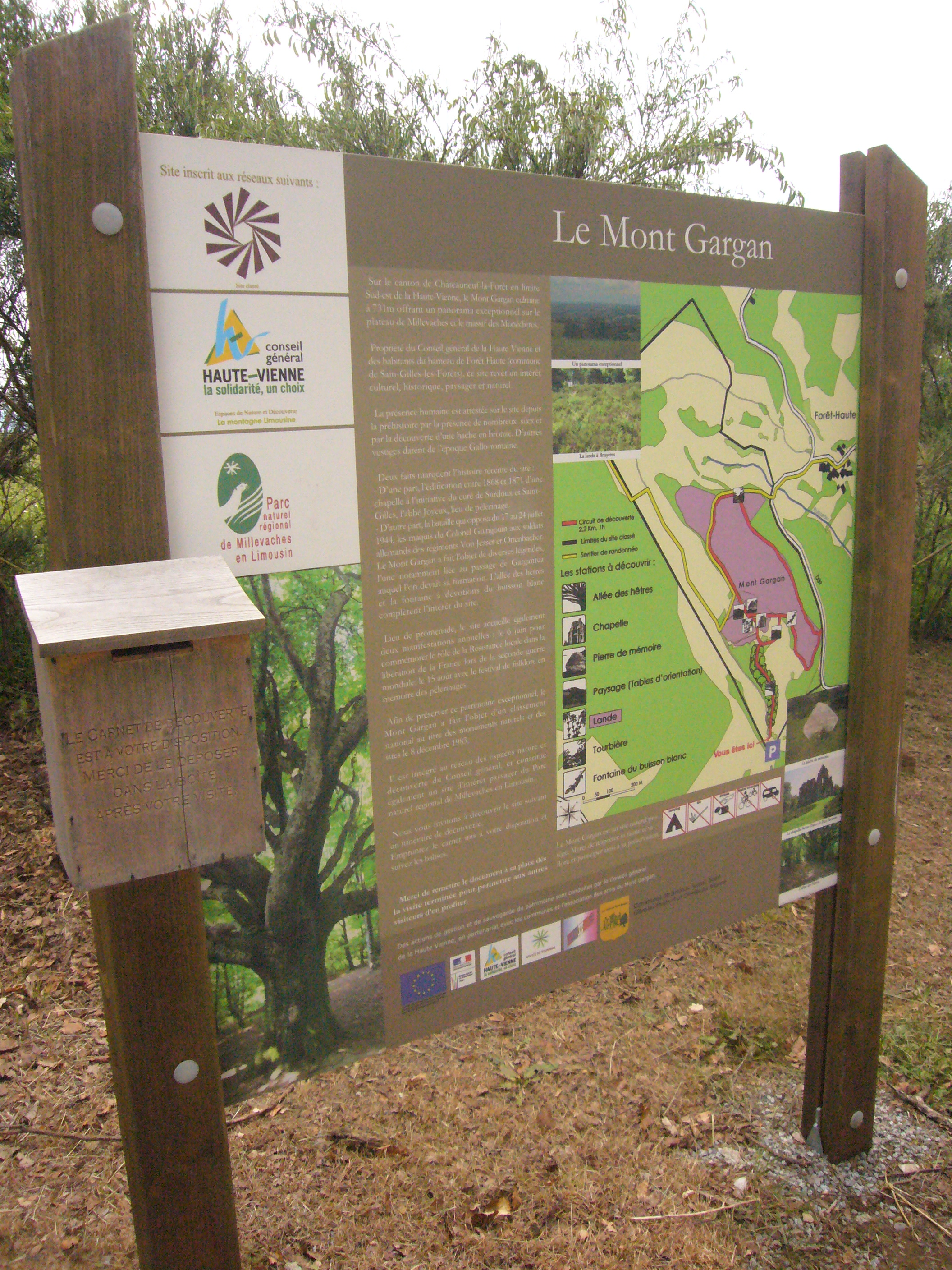 Panneau situé au départ du sentier d'accès au Mont Gargan (Haute-Vienne, France)